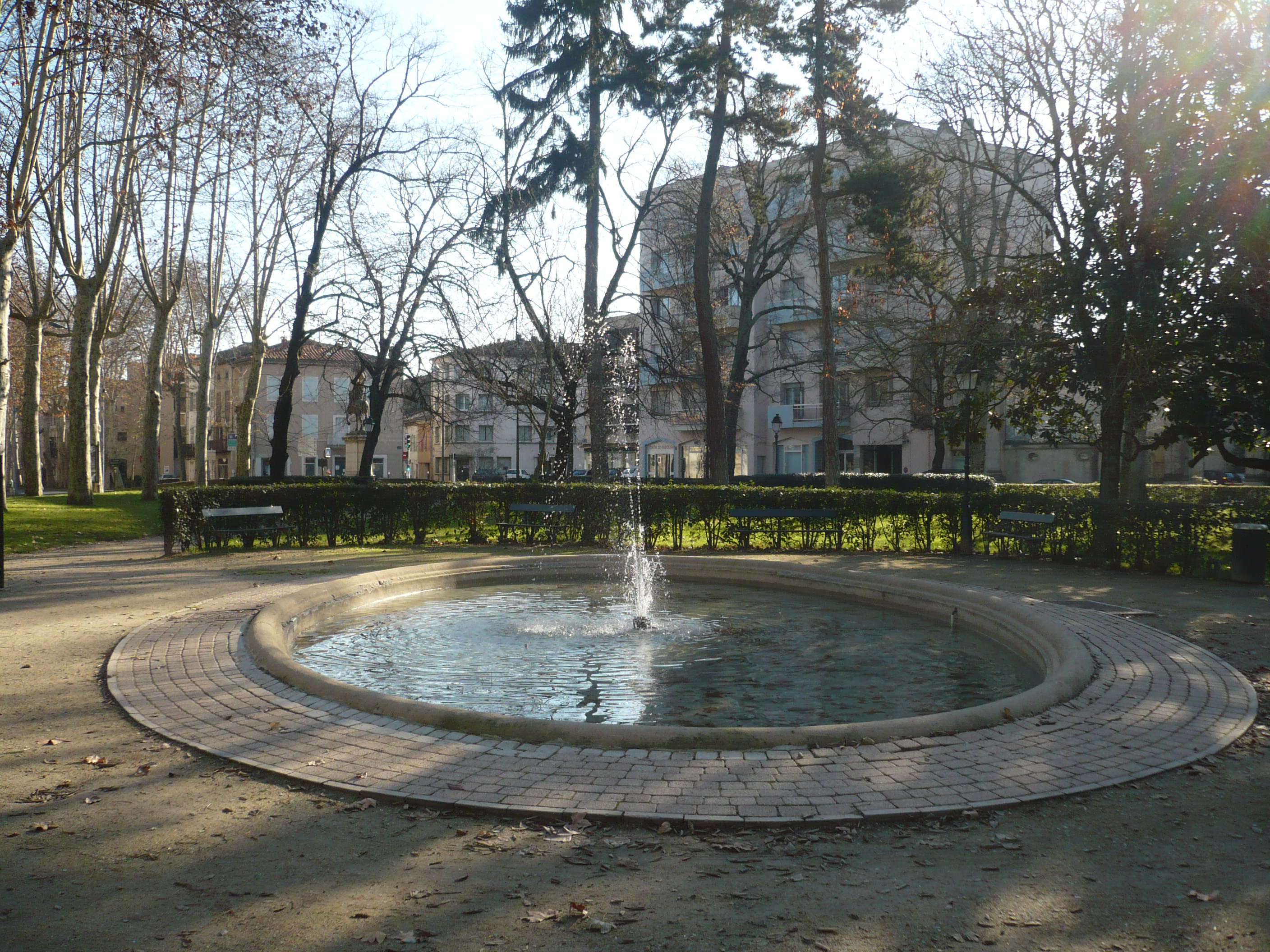 Castres